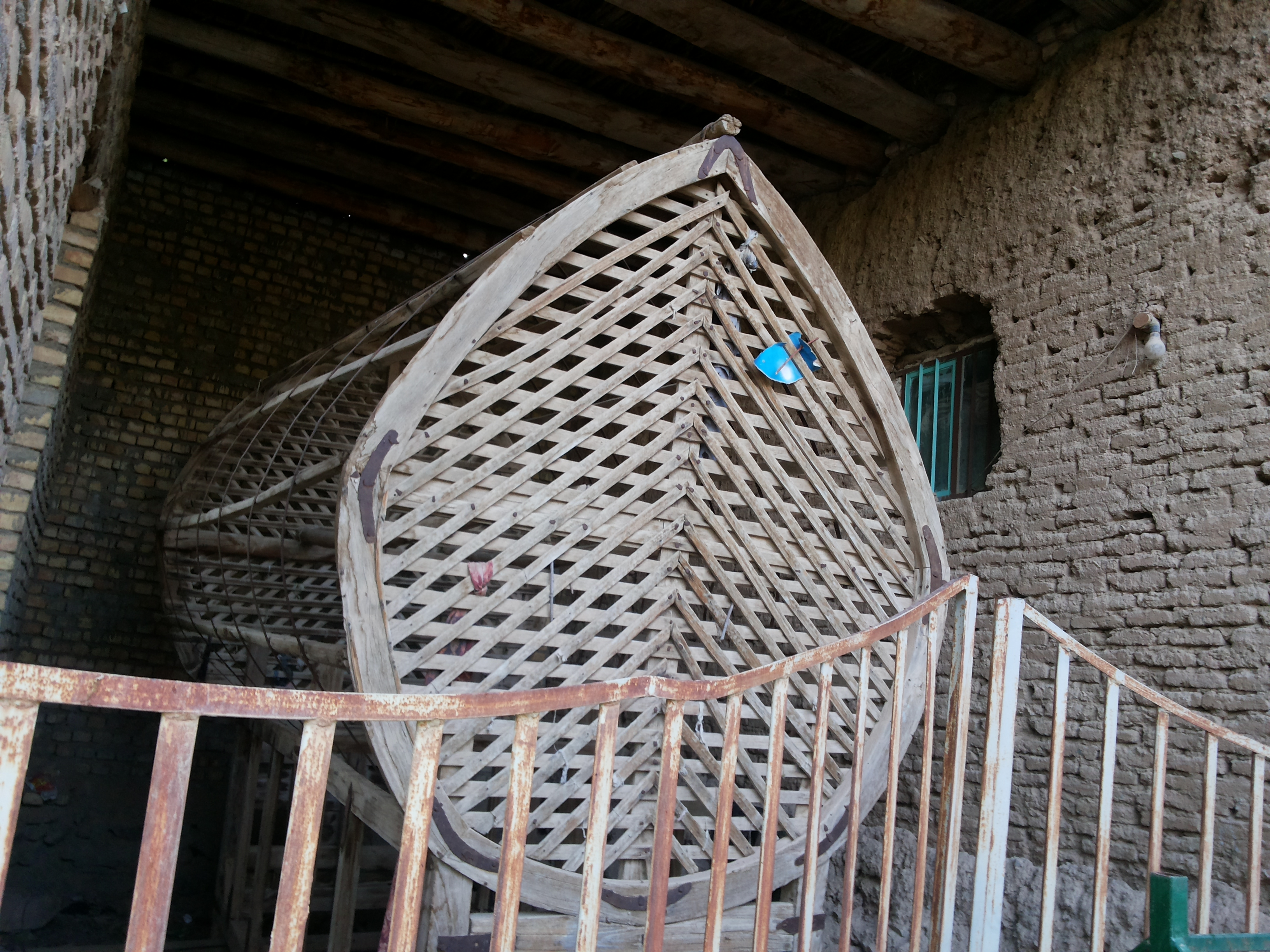 نخل عزاداری